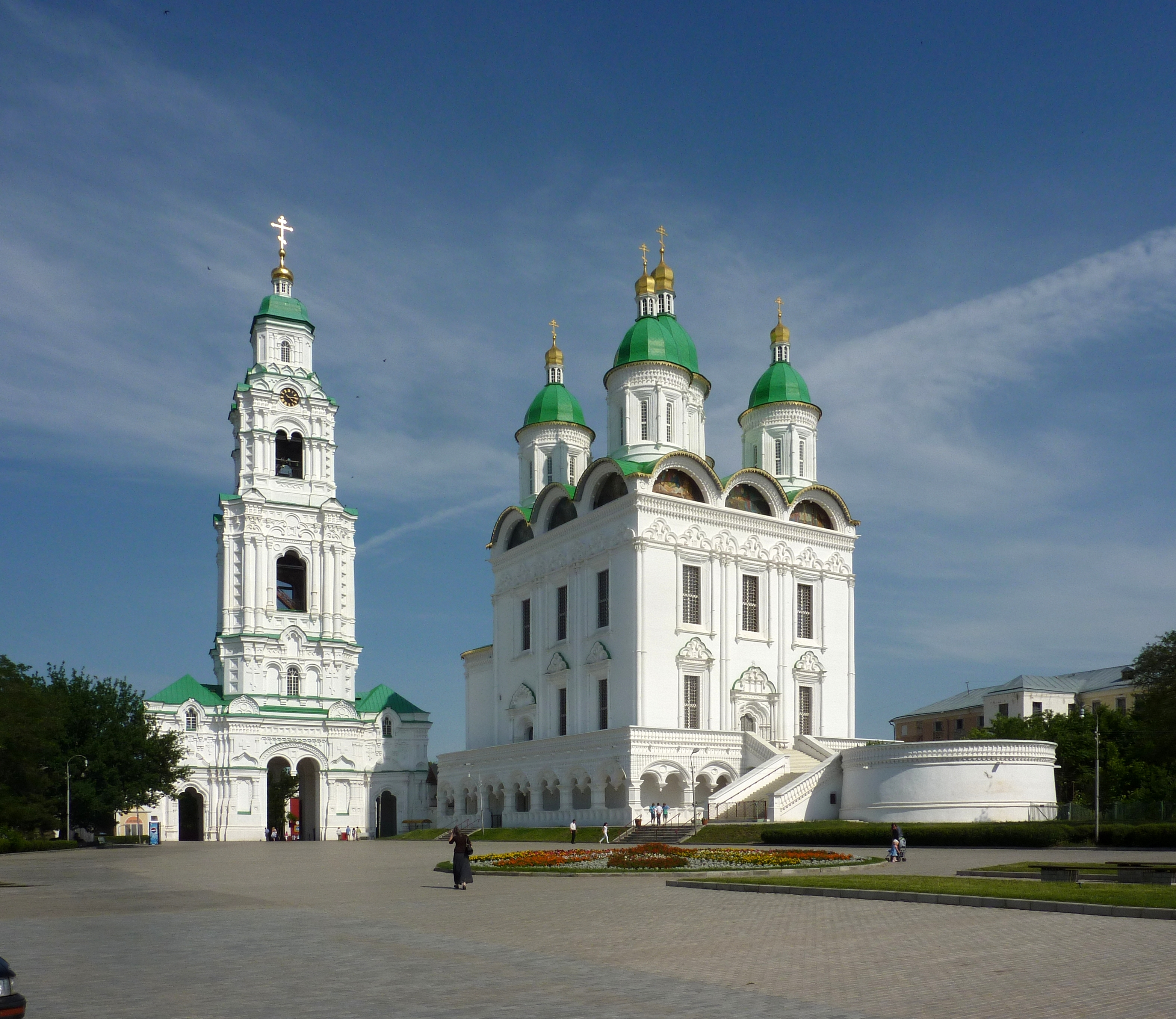 Кремль, Успенский собор (Астрахань)